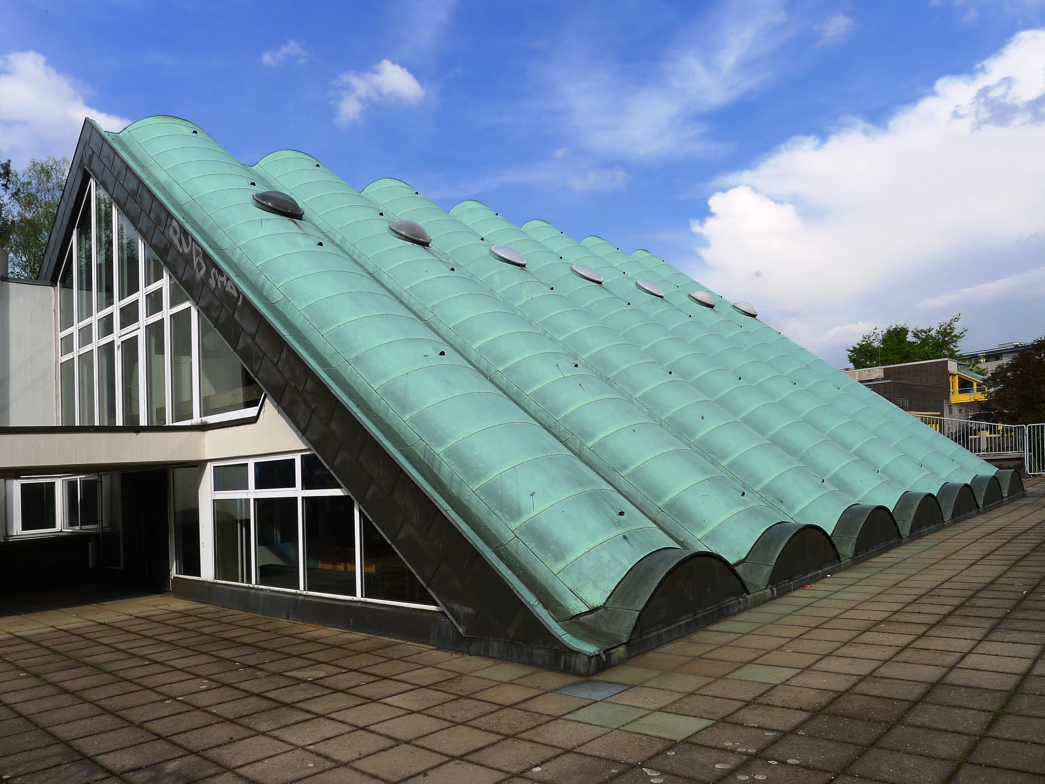 Blick auf die südliche Dachfläche